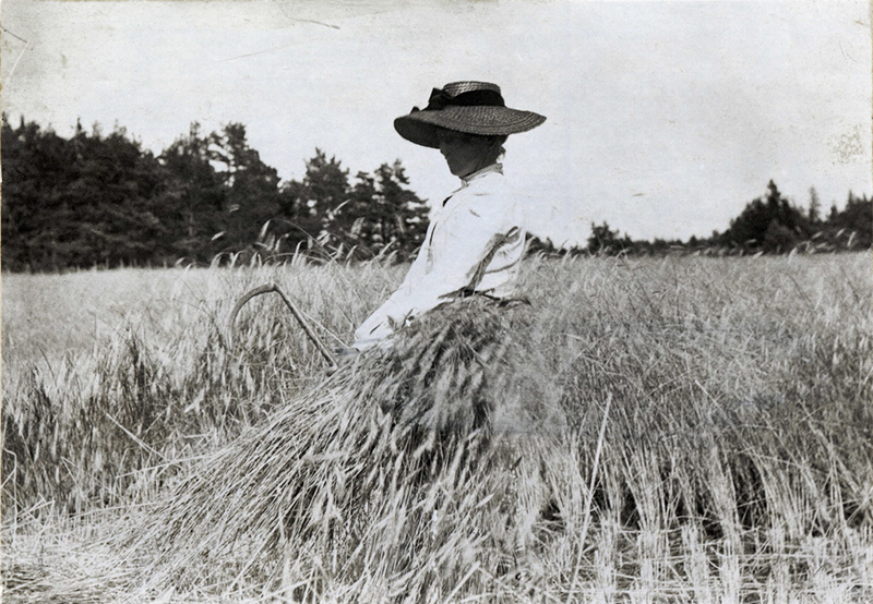 Västerhejde socken, Gotland. Jordbruk, skörd. "Manda Bobar tar upp ryg med krok i Västerhejd".